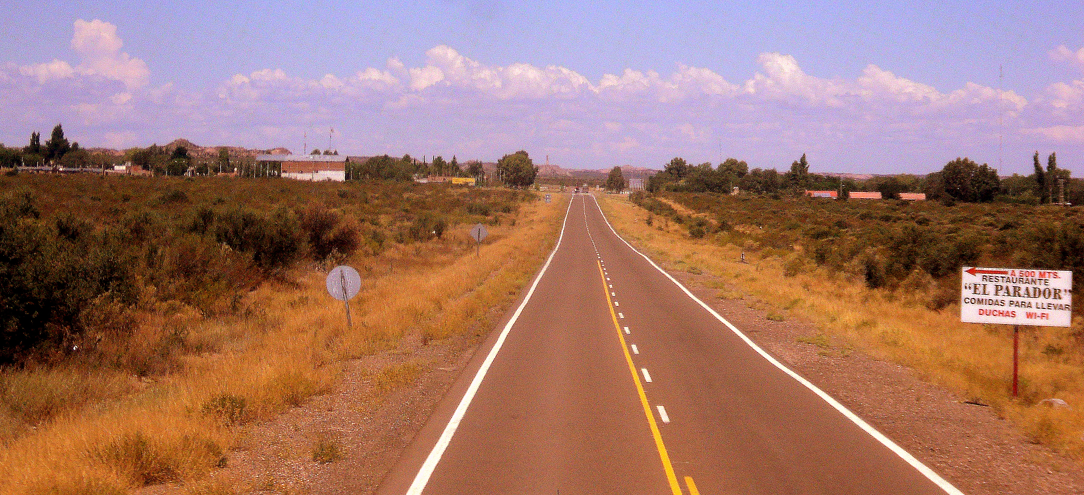 darwin en la lejania